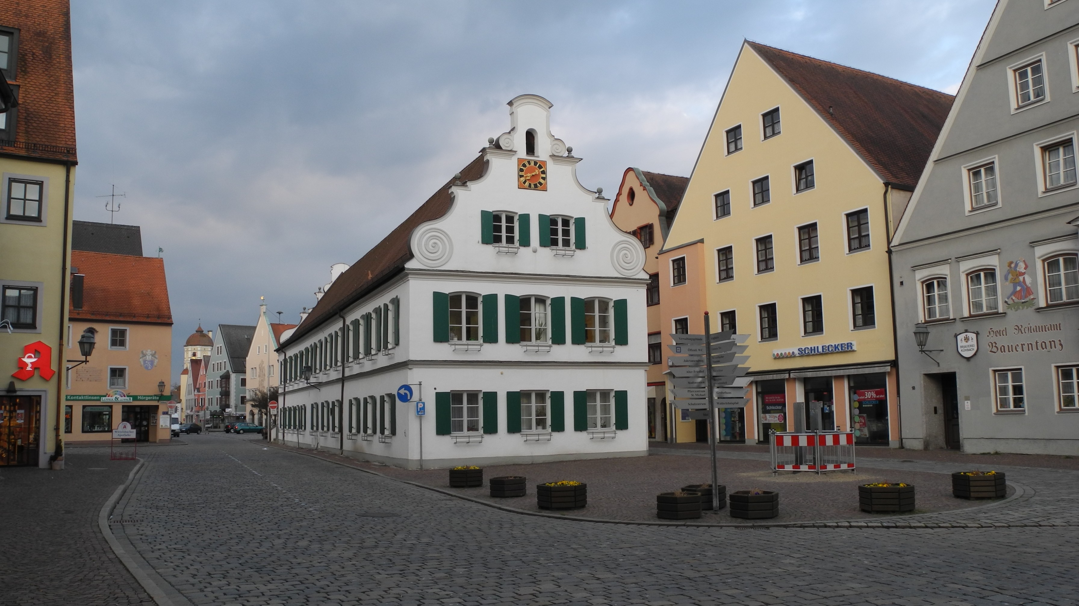 Aichach-Rathaus ab 1221, heutiges Aussehen von 1704